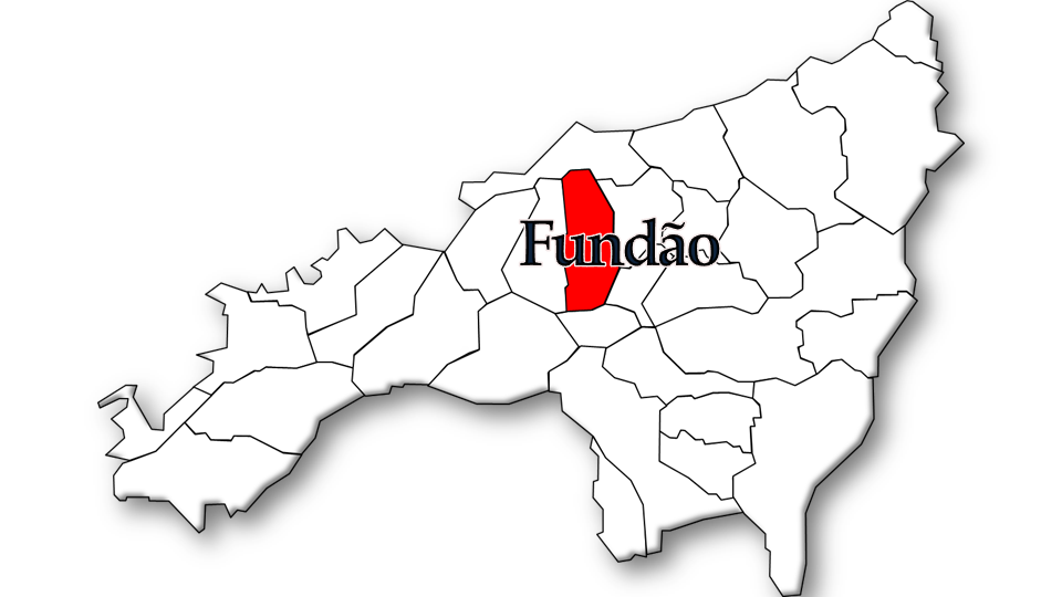 População